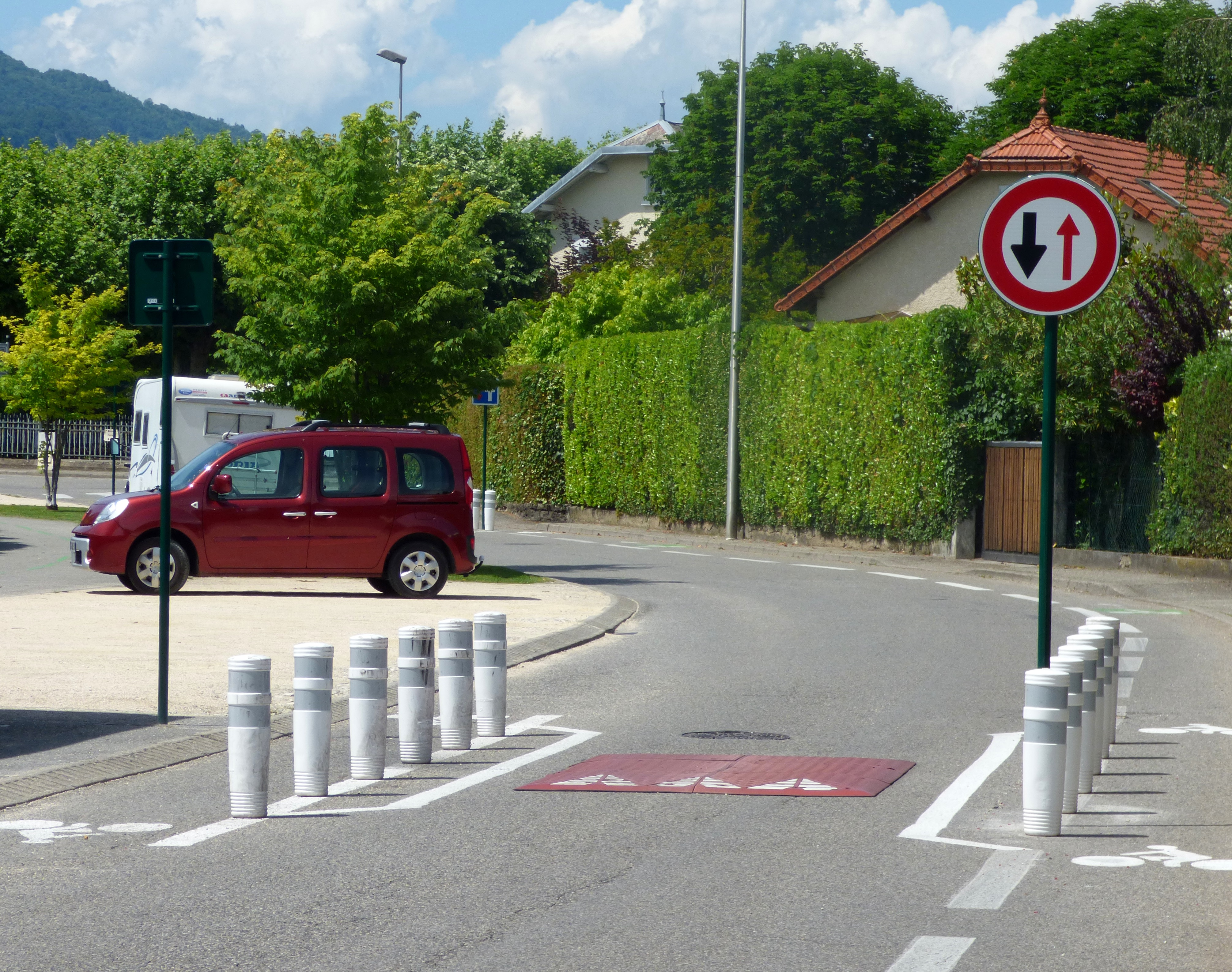 Une écluse centrale de voirie avec "by-pass vélo" à Aix-les-Bains (Savoie).